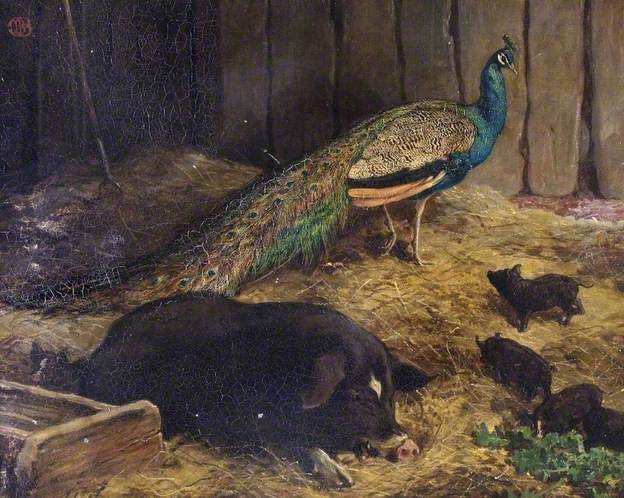 Beauty and the Beast by Charles Burton Barber.jpg (Картина анімалістичного жанру роботи британського художника Чарльза Бартона Барбера)